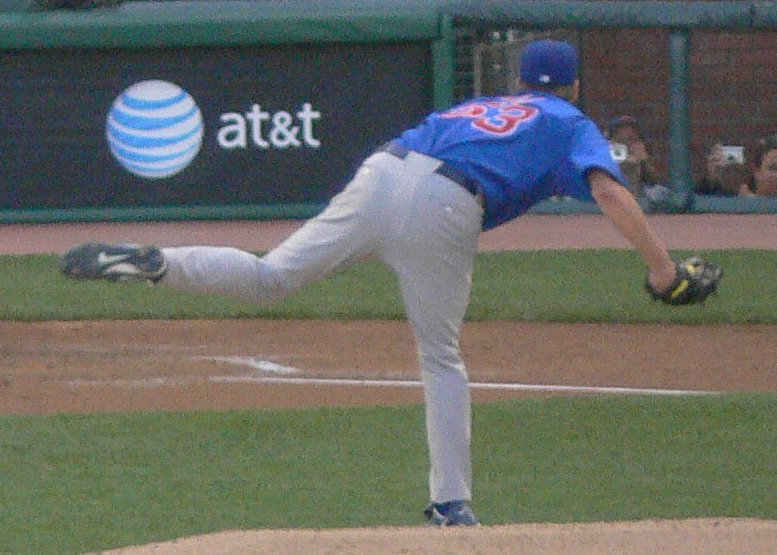 Rich Hill